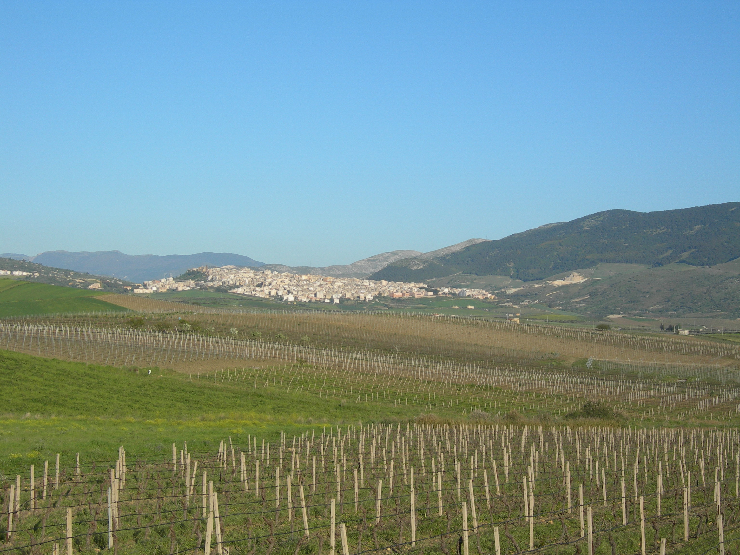 Panorama di Sambuca di Sicilia (provincia di Agrigento)